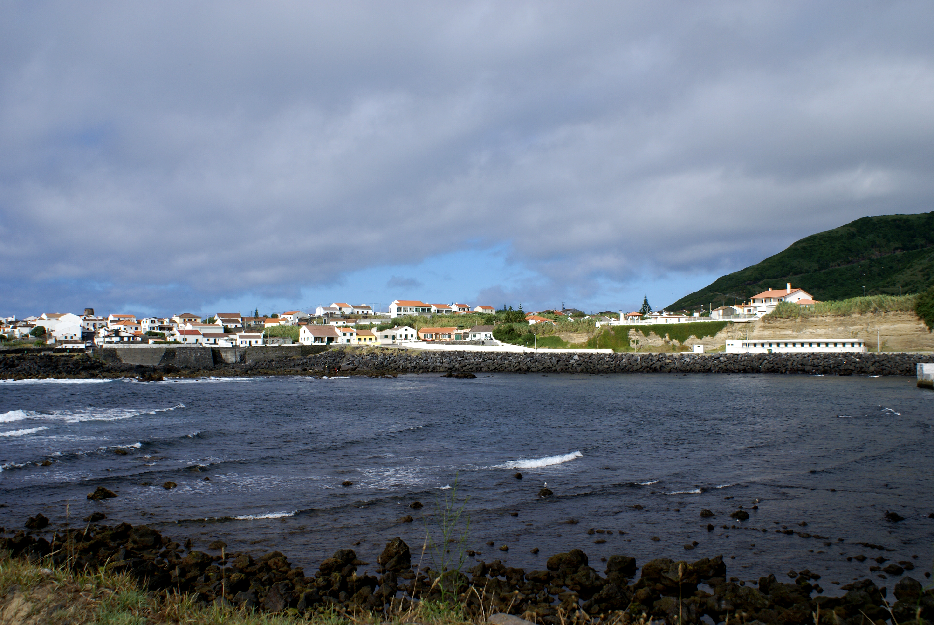 Mosteiros, vista geral, ilha de São Miguel, Açores